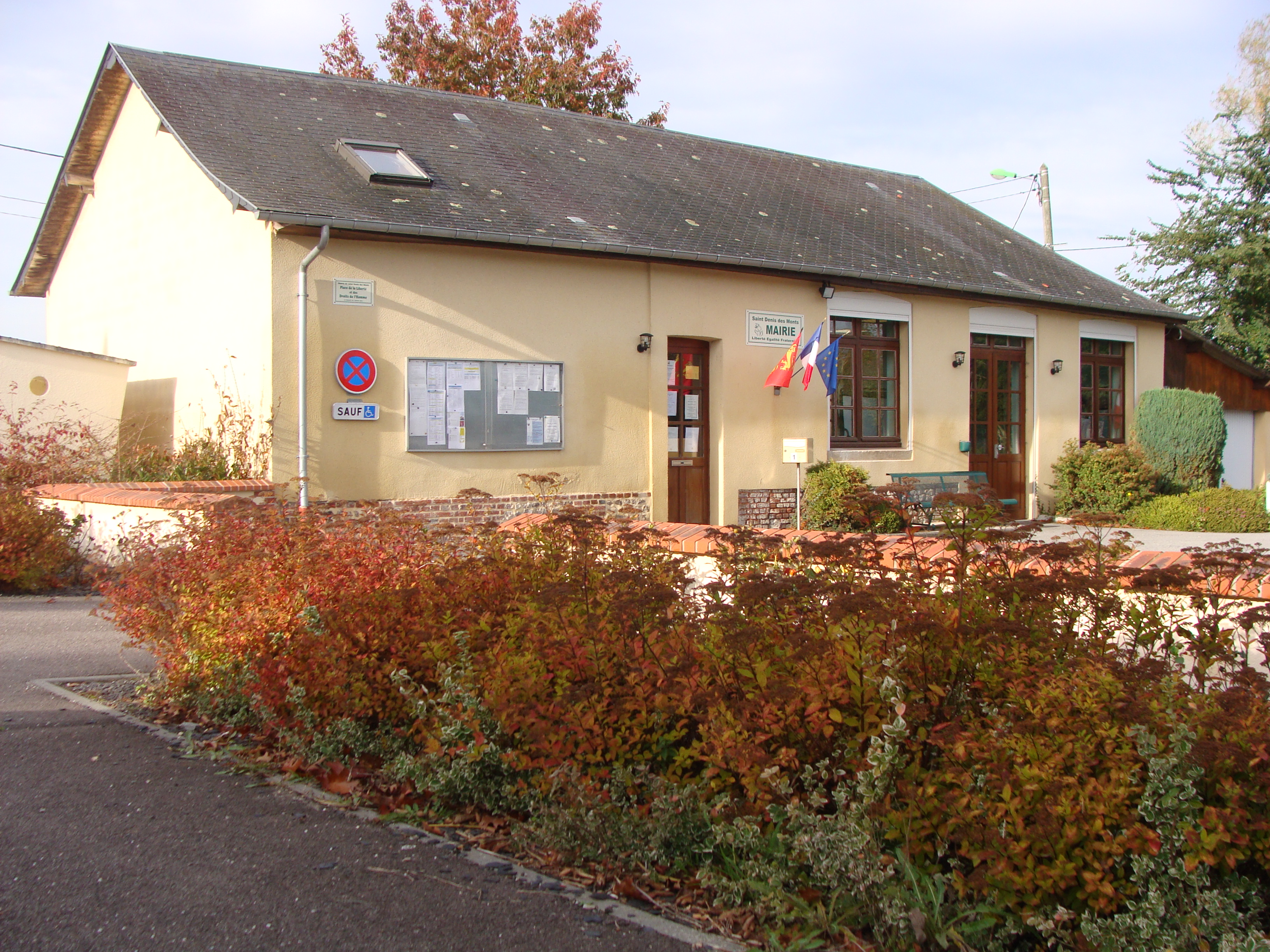 Mairie de Saint Denis des Monts